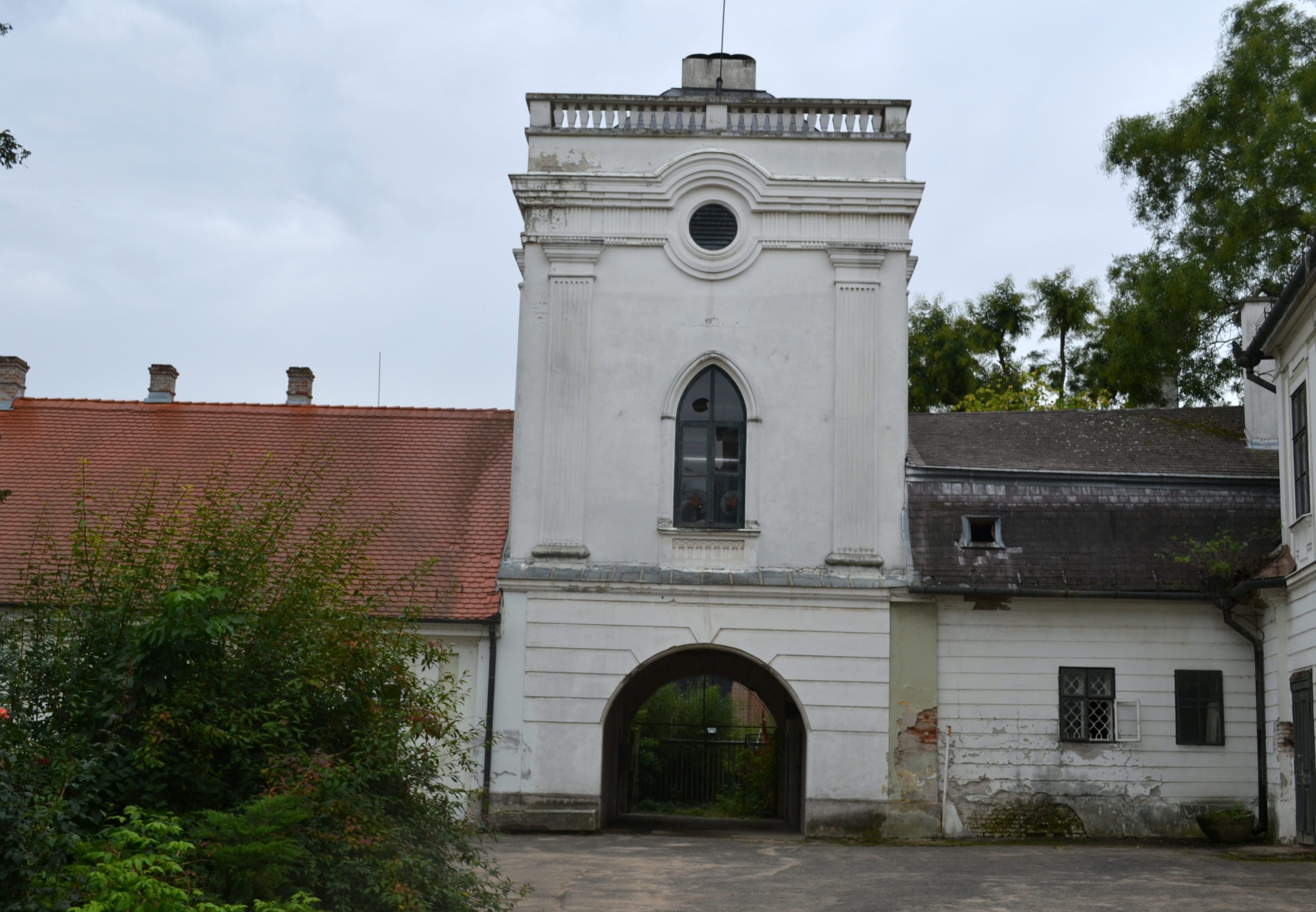 Harruckern–Wenckheim–Almássy-kastély együttese és parkja This is a photo of a monument in Hungary. Identifier: 2477